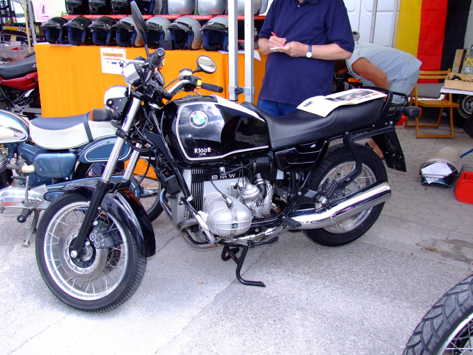 Quelle: selbst fotografiert, 07/2006 Fotograf: Späth Chr.